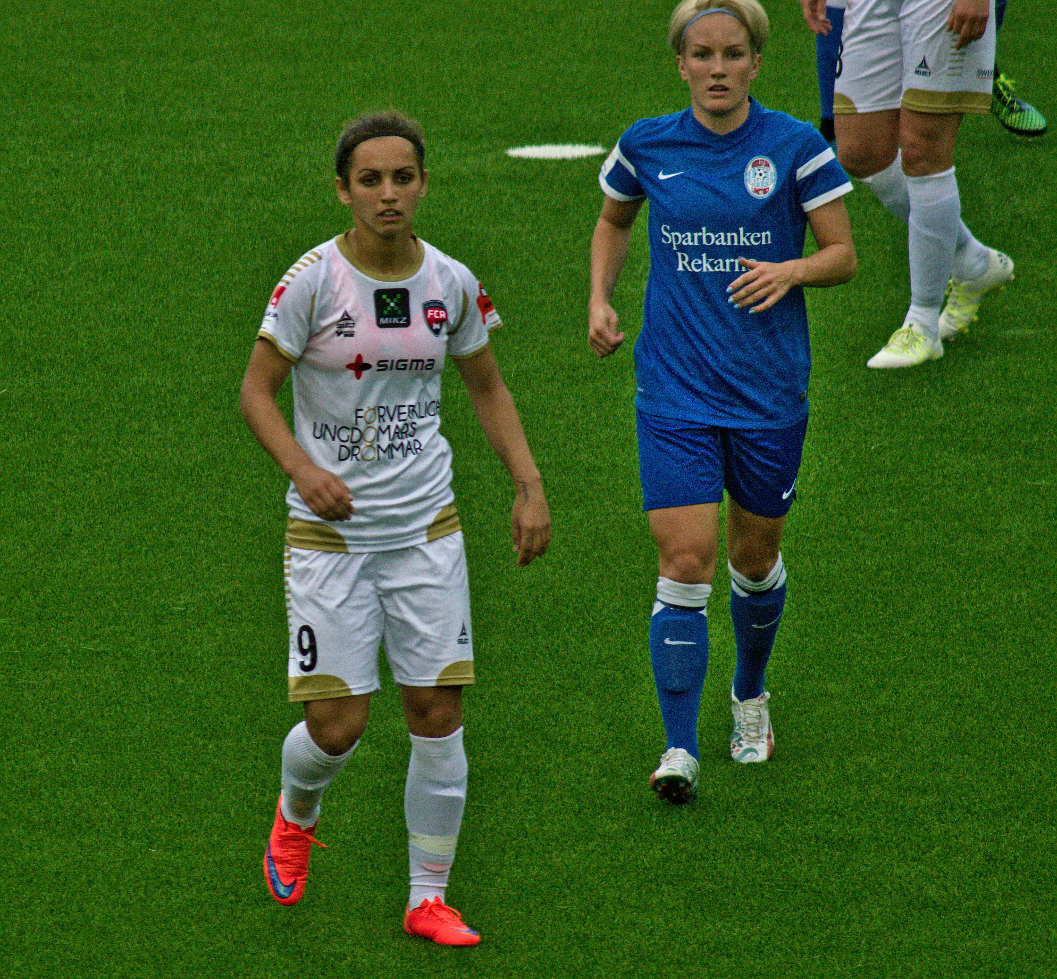 Eskilstuna United - FC Rosengård, Tunavallen i Eskilstuna 5 augusti 2015. Första halvlek.